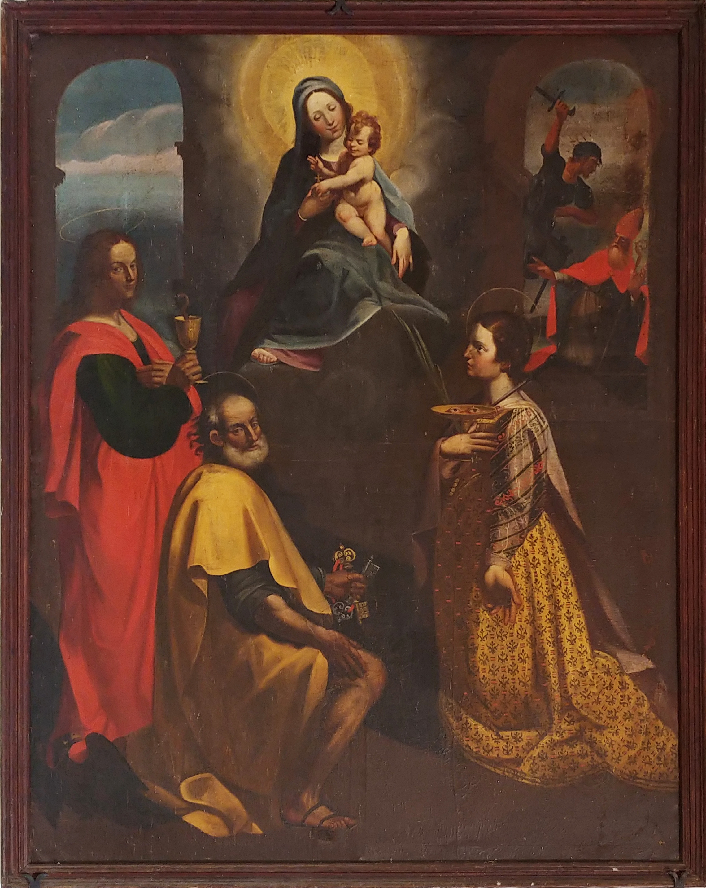 Scuola di Francesco Nasini, Madonna col Bambino fra i santi Giovanni Evangelista, Pietro Apostolo e Lucia martire .